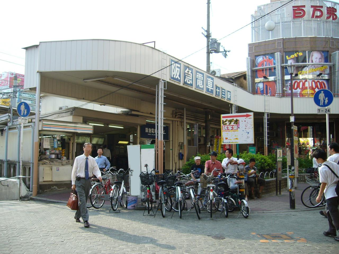 阪急十三駅 東口